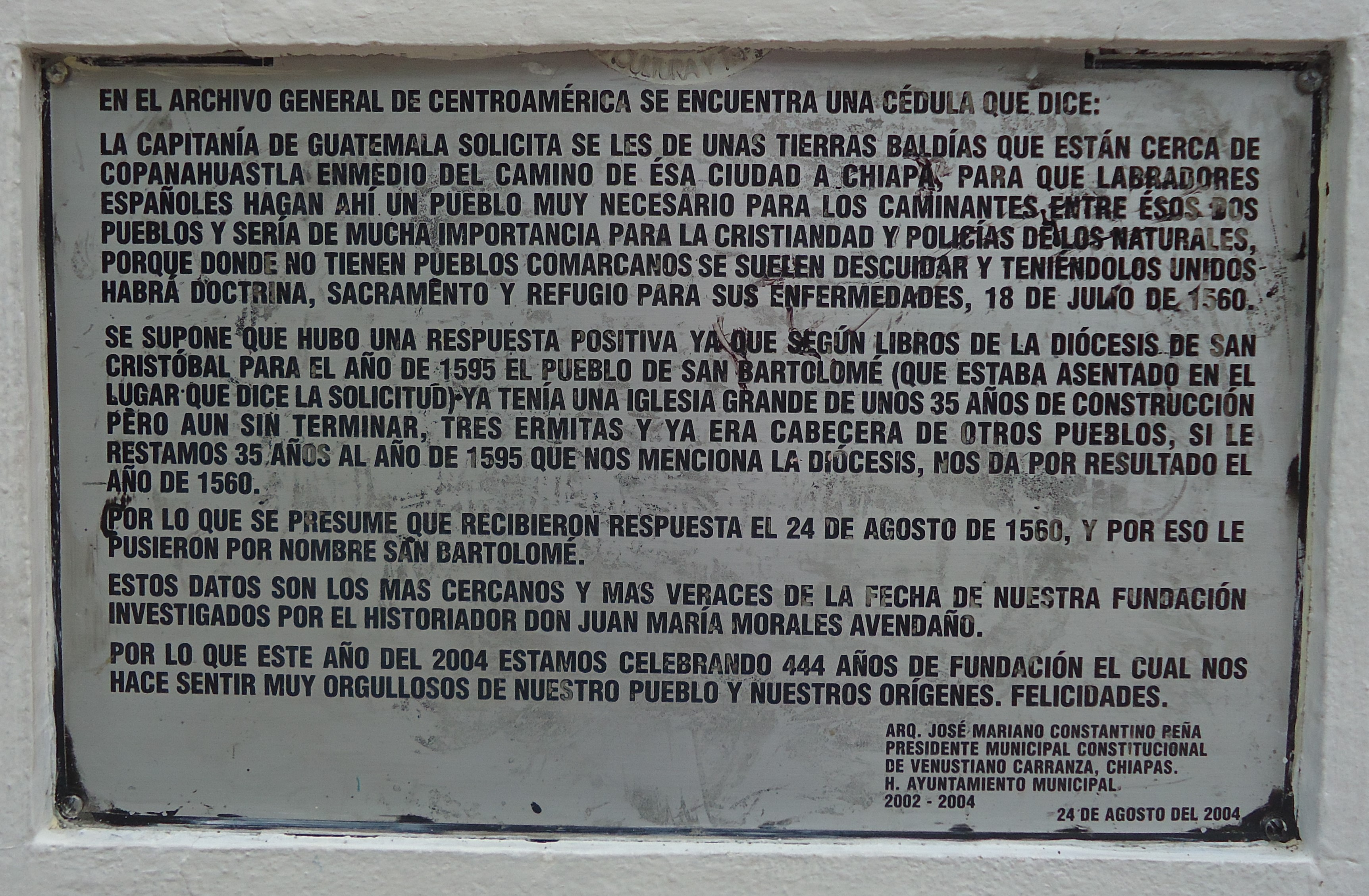 Placa conmemorariva fundacion del pueblo de Venustiano Carranza en Chiapas México